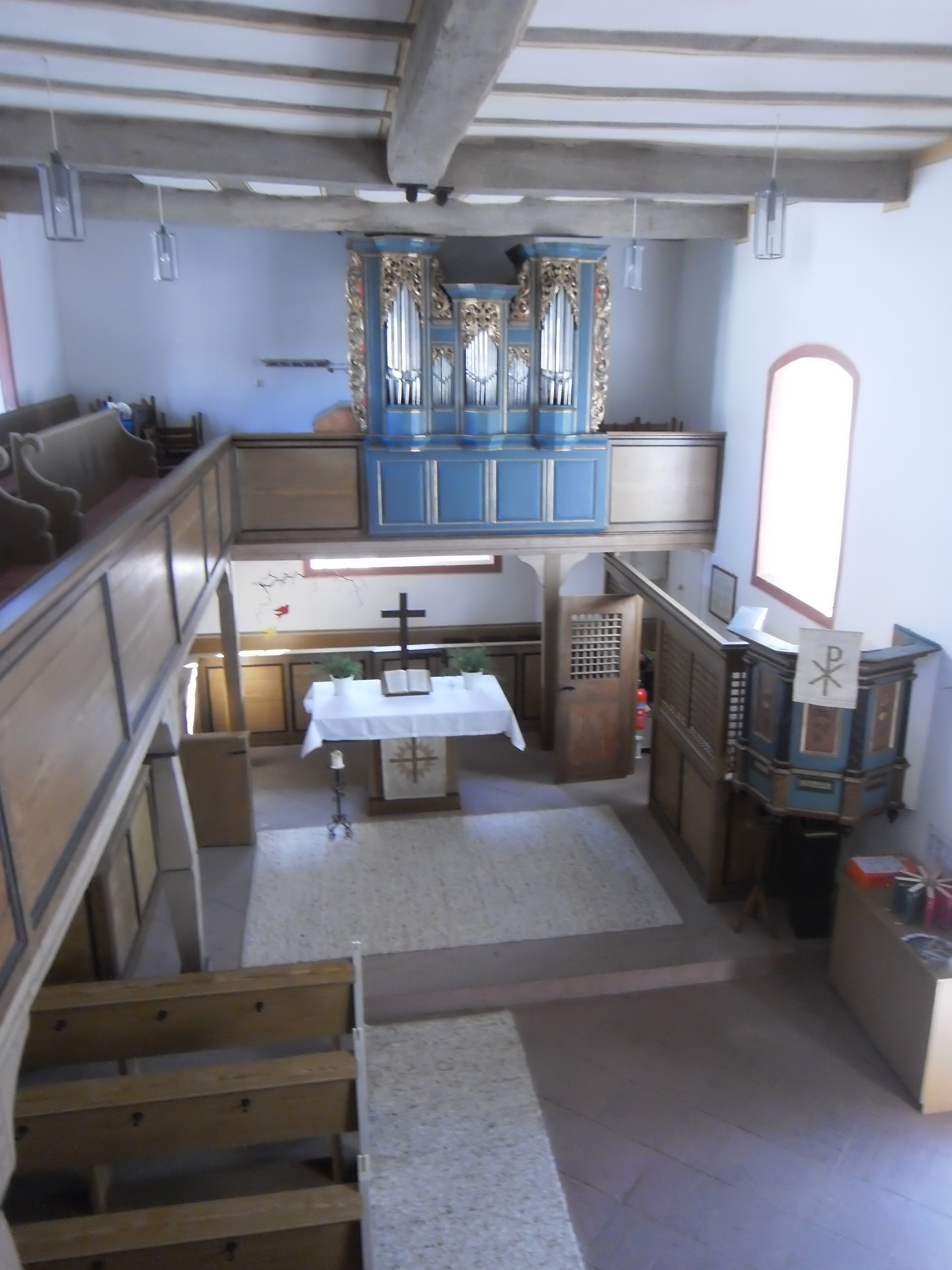 Evangelische Kirche Bissenberg, Leun, Lahn-Dill-Kreis, Hessen, Deutschland